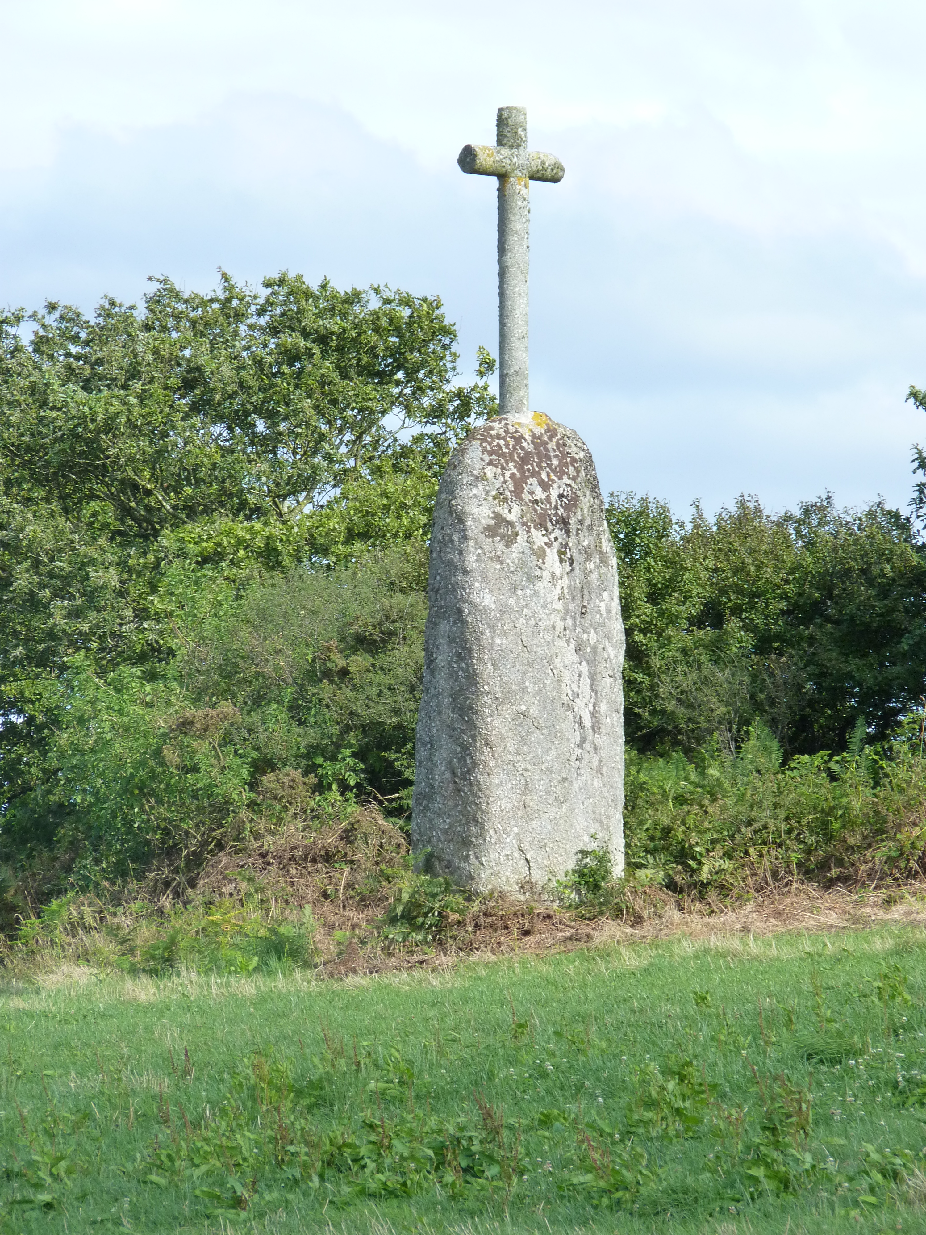 Environ 4 m de hauteur.